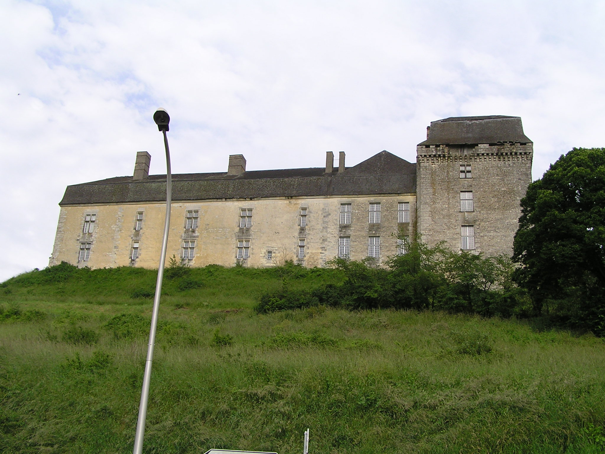 château de Chalais, Charente, France